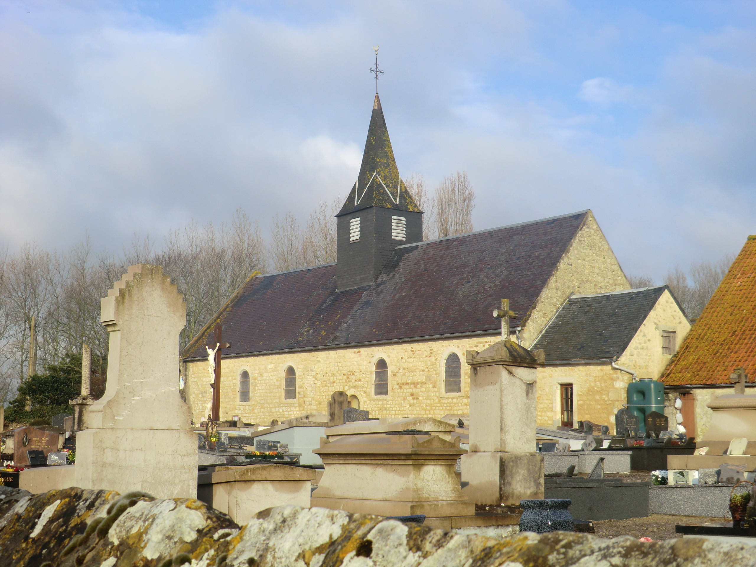 Eglise de Beuvrequen, commune du Pas-de-Calais, en France.